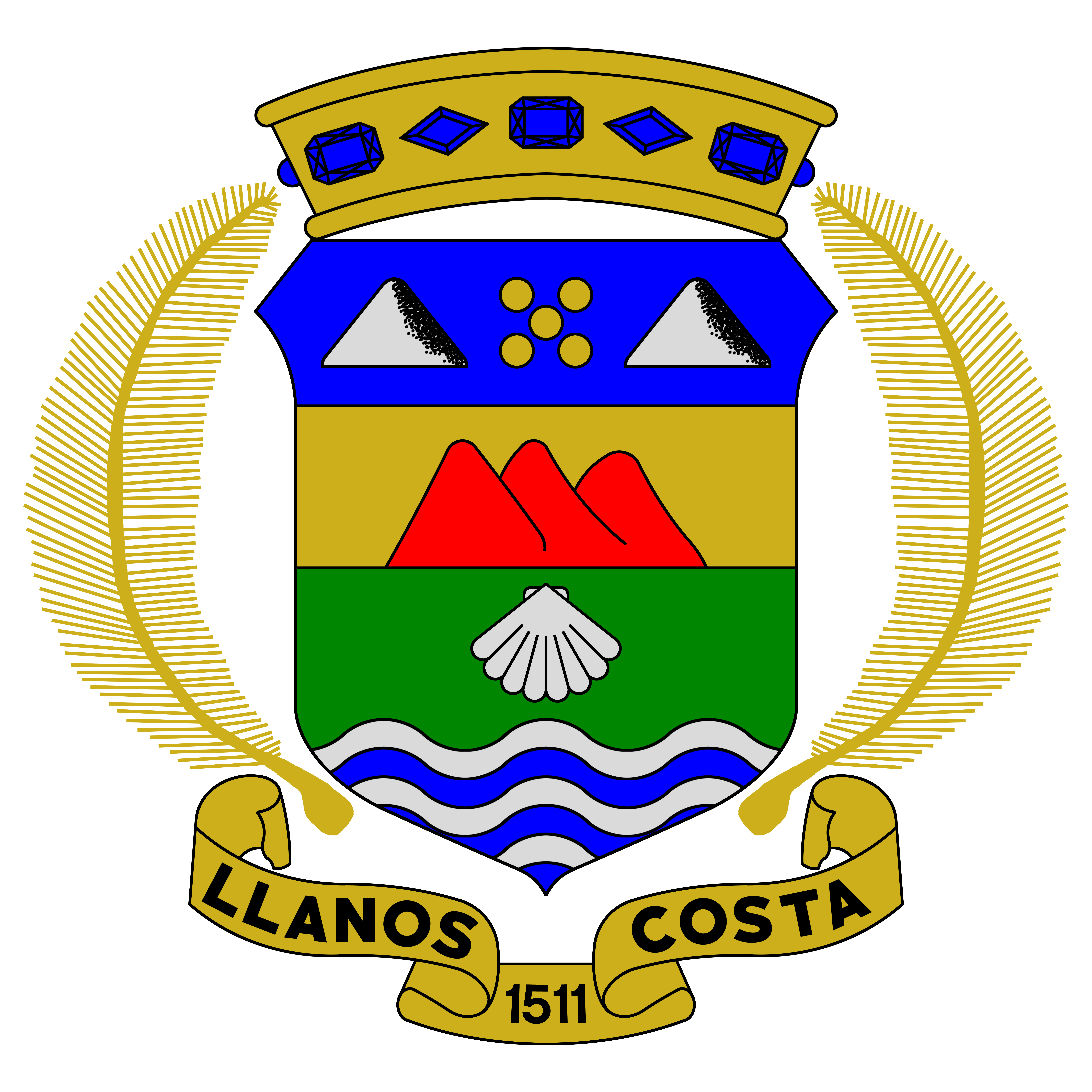 Escudo del Barrio Llanos Costa